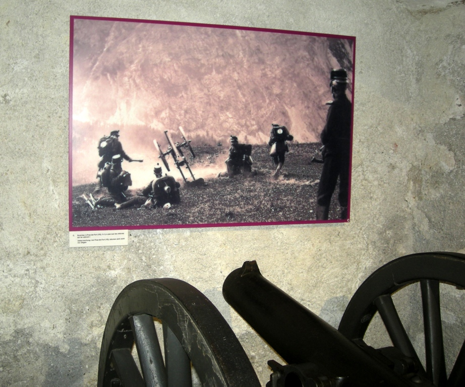 Geb Kan Ord 1877, Rückstoss